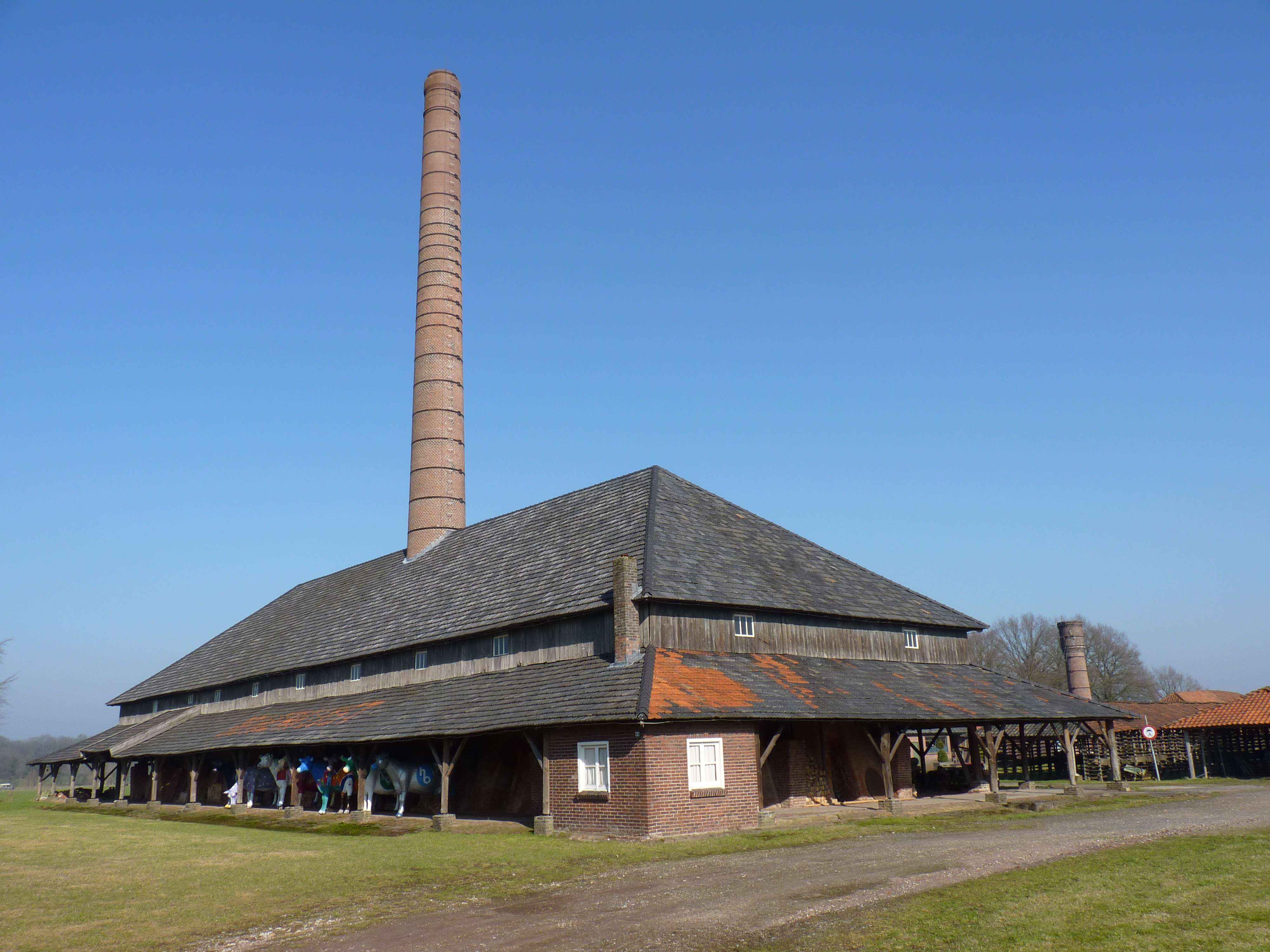 Losser Steenfabriek De Werklust